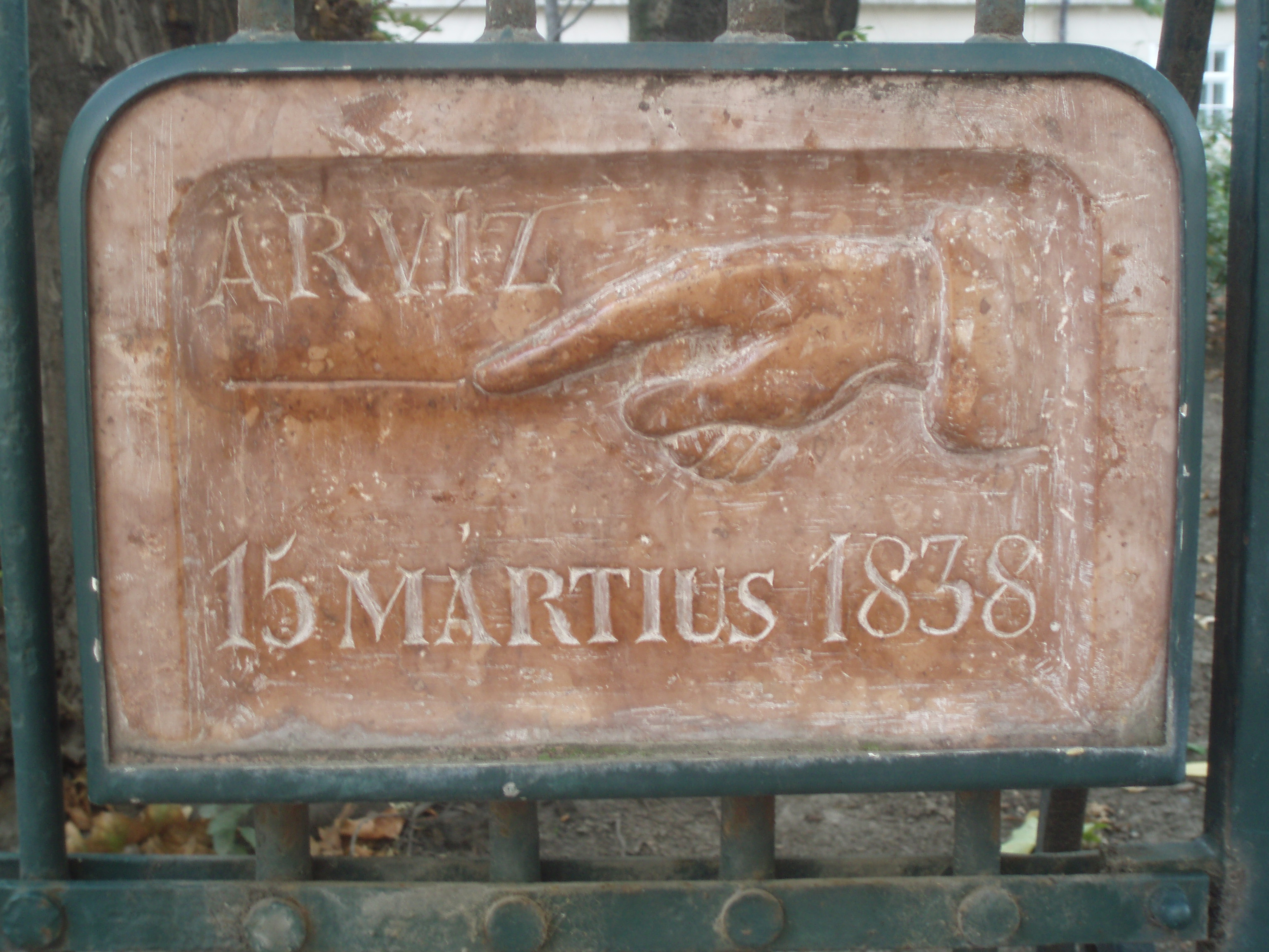 Az 1838-as pesti árvíz szintjét jelző tábla a Nemzeti Múzeum kerítésén (Bródy Sándor utca)